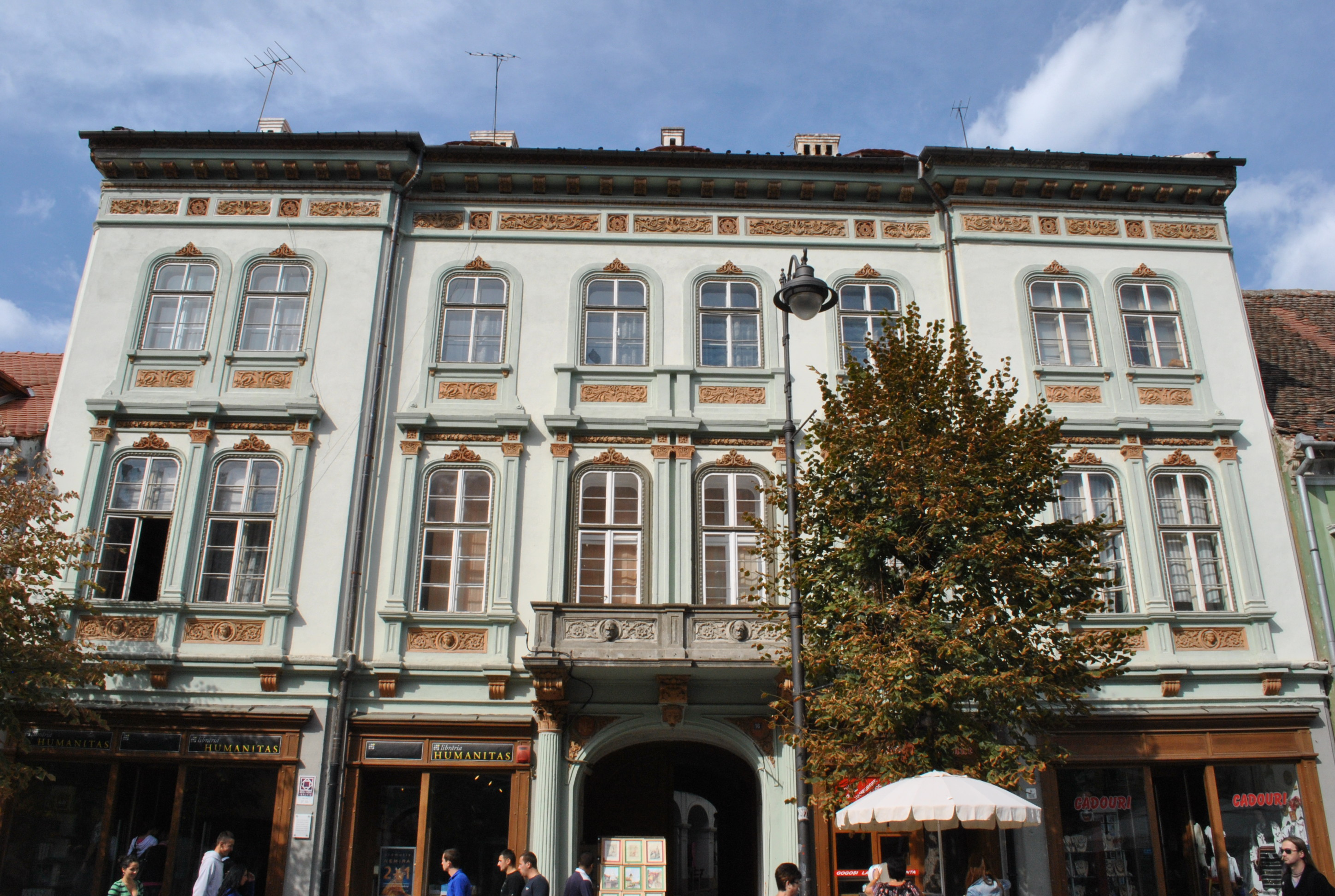 Casă, 1875 - 1900